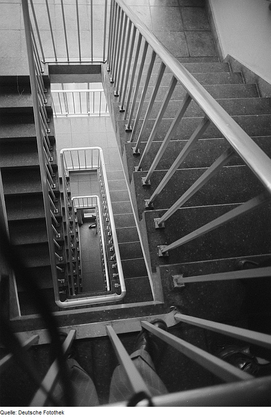 Original image description from the Deutsche Fotothek Treppenhaus des Gebäudes der Leipziger Volkszeitung